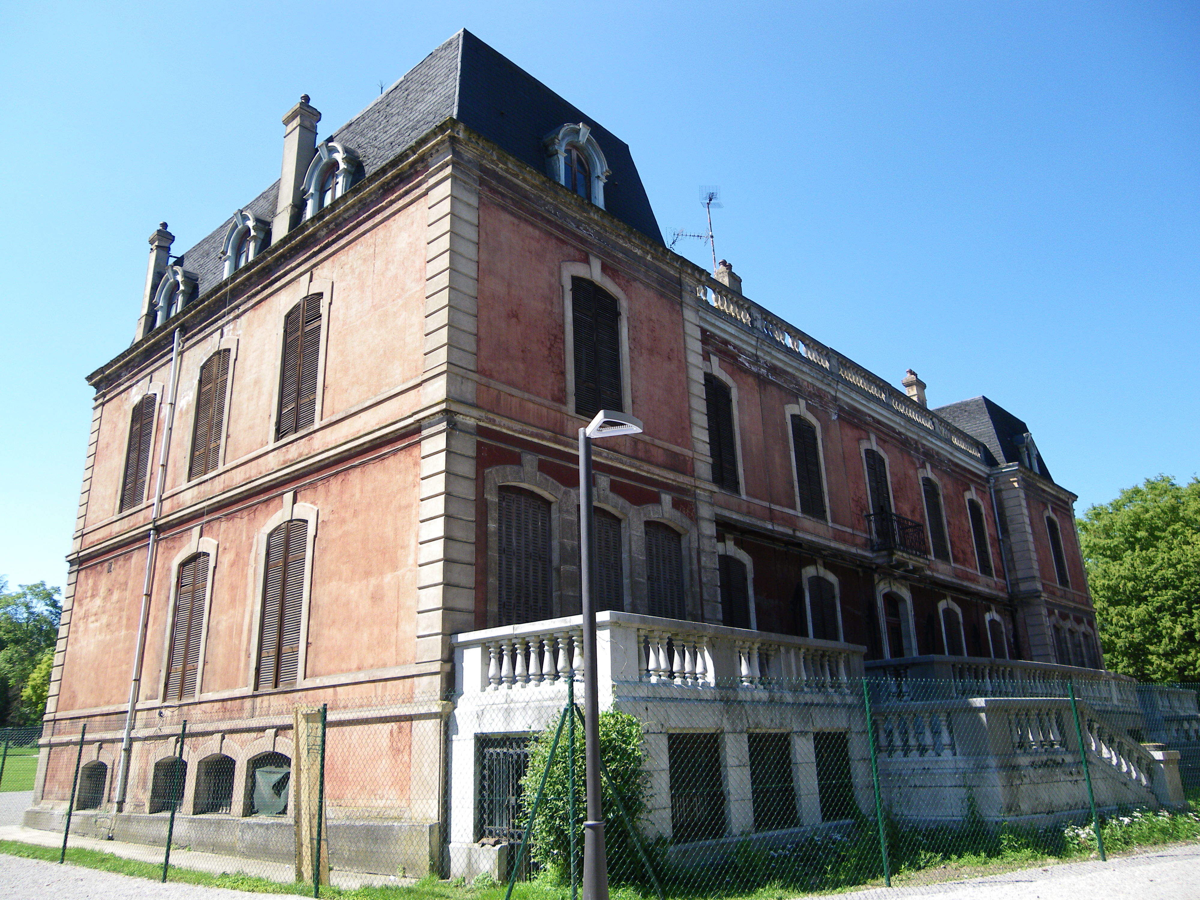 Munoa jauregia, Juan Echevarría La Llana jaunaren aginduz, XIX. mendearen bukaeran eraikitakoa, Barakaldo, Bizkaia, Euskal Herria.